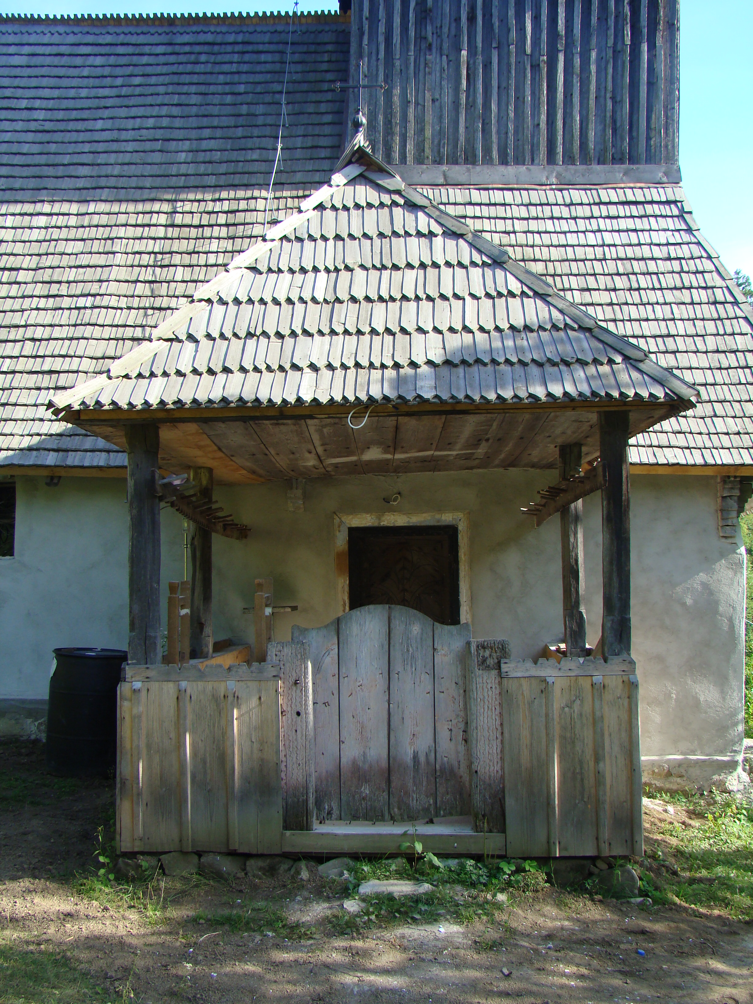 Biserica de lemn „Cuvioasa Paraschiva” din Ribicioara-Hunedoara